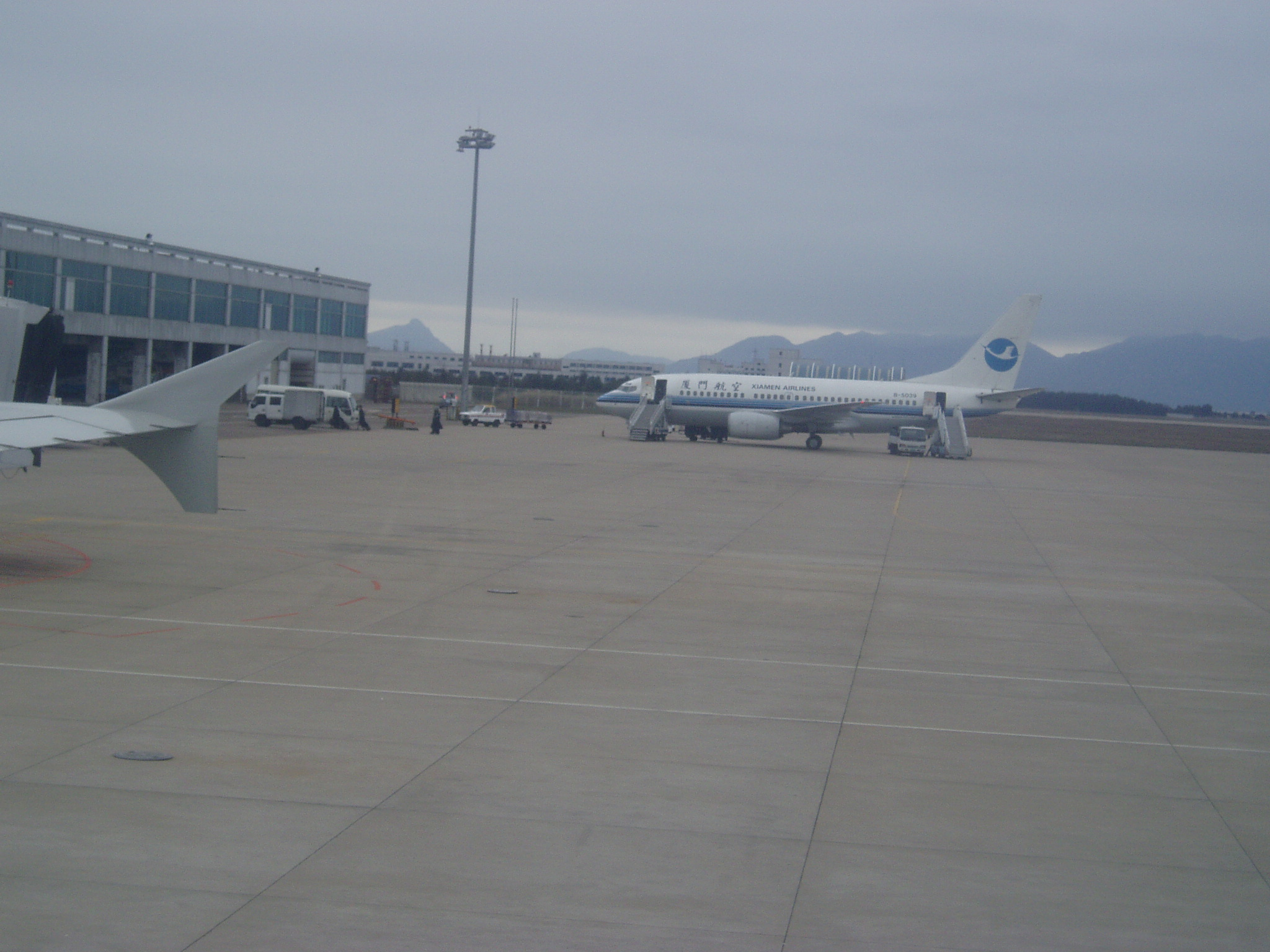 福州长乐国际机场跑道，wahapure使用奥林巴斯数码相机拍摄。